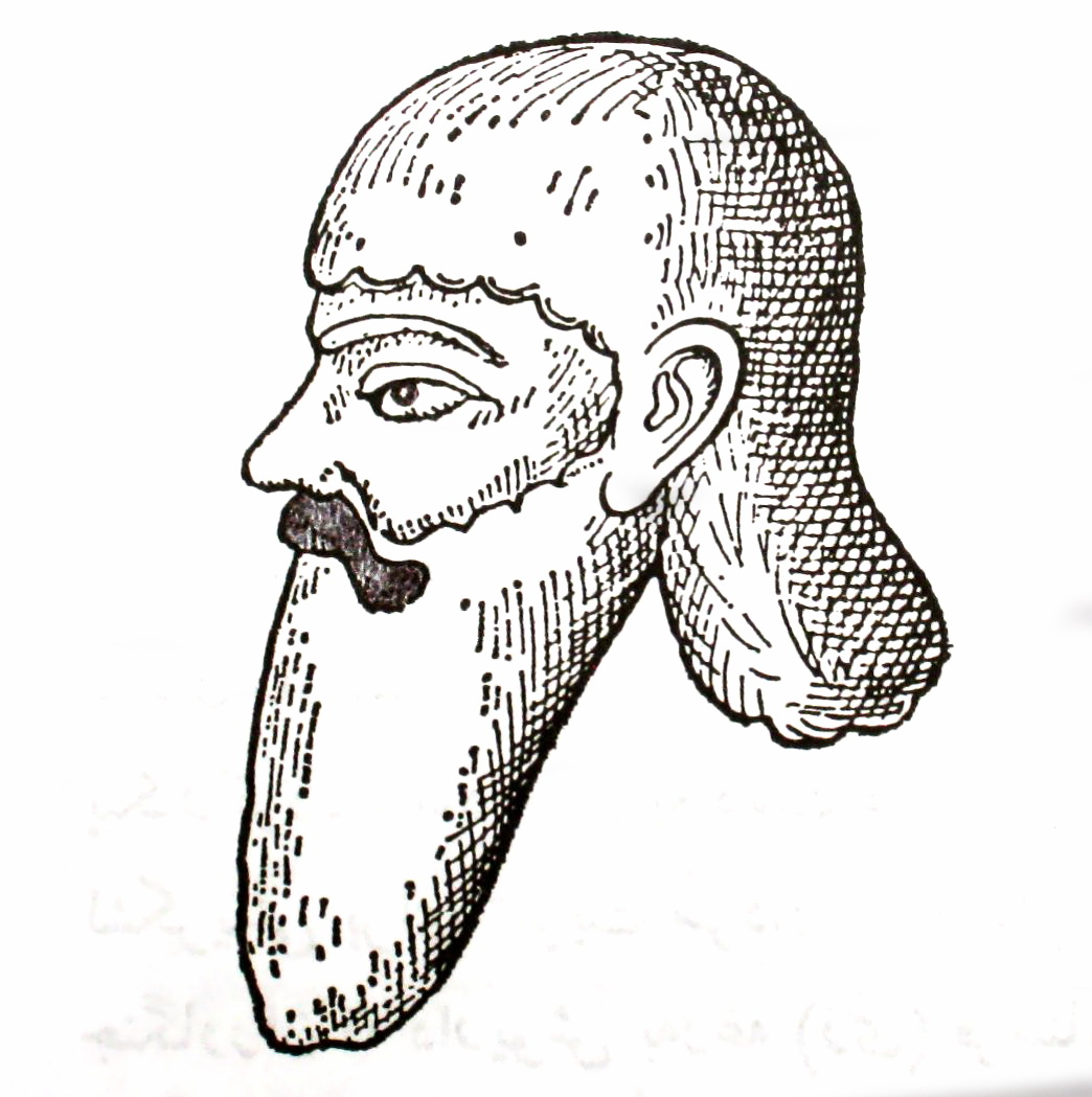 چهره باز سازی شده فرورتیش‌دوم عاصی ماد زمان داریوش، از نقش بر جسته بیستون